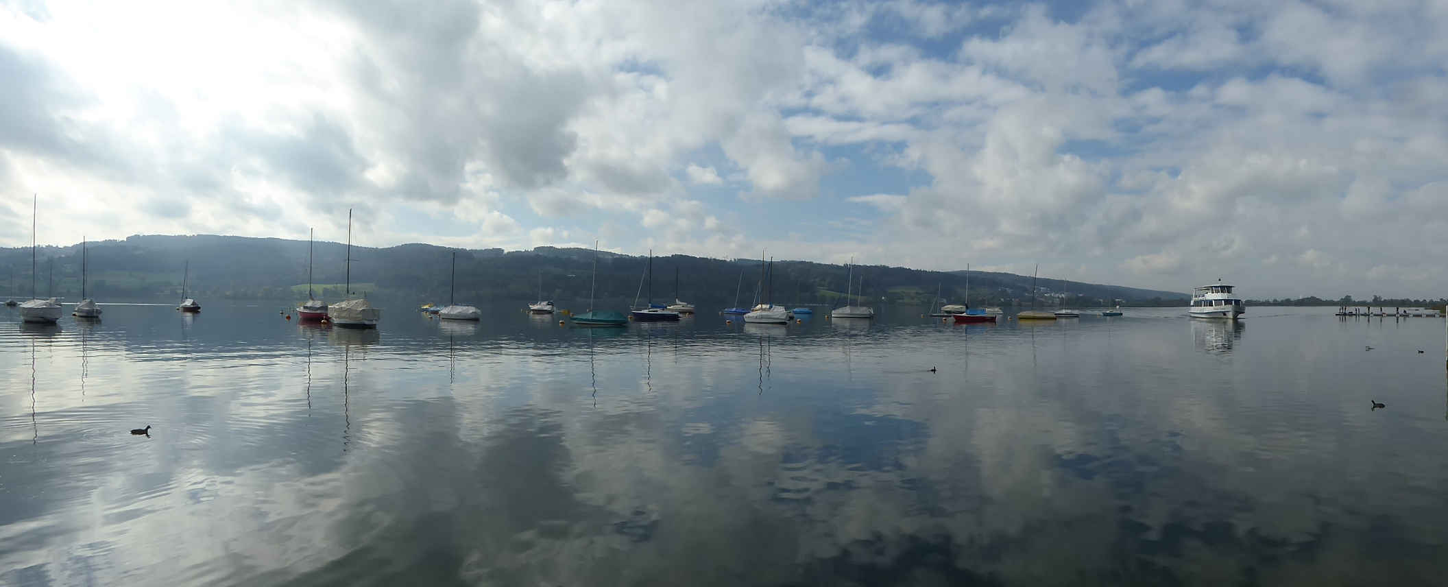 Greifensee Schiffstation